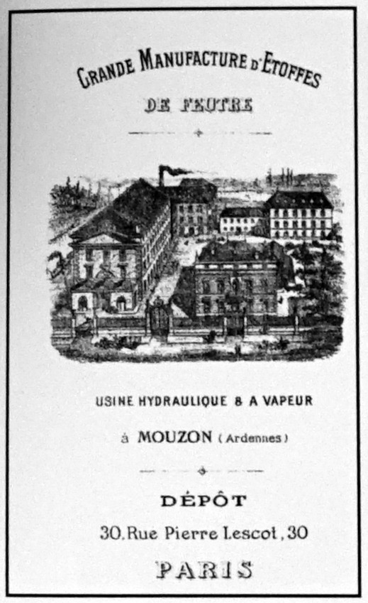 d'une usine ancienne.